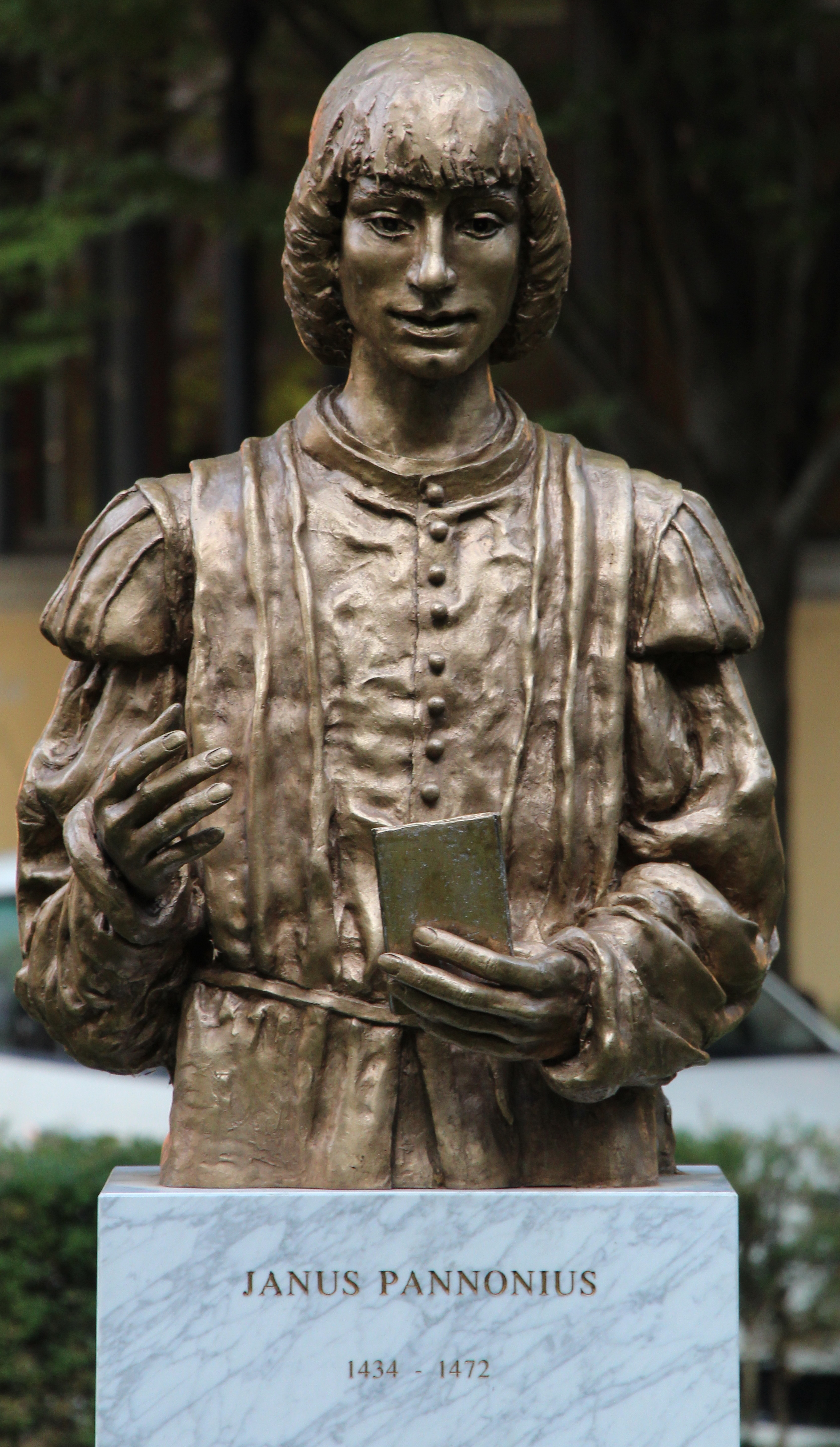 Questo busto del letterato Janus Pannonius è situato nel cortile interno di palazzo Maldura a Padova.